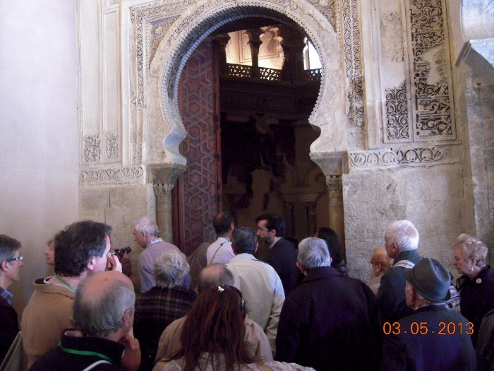 Kongresanoj dum vizito al la Alĝaferio: la araba preĝejo